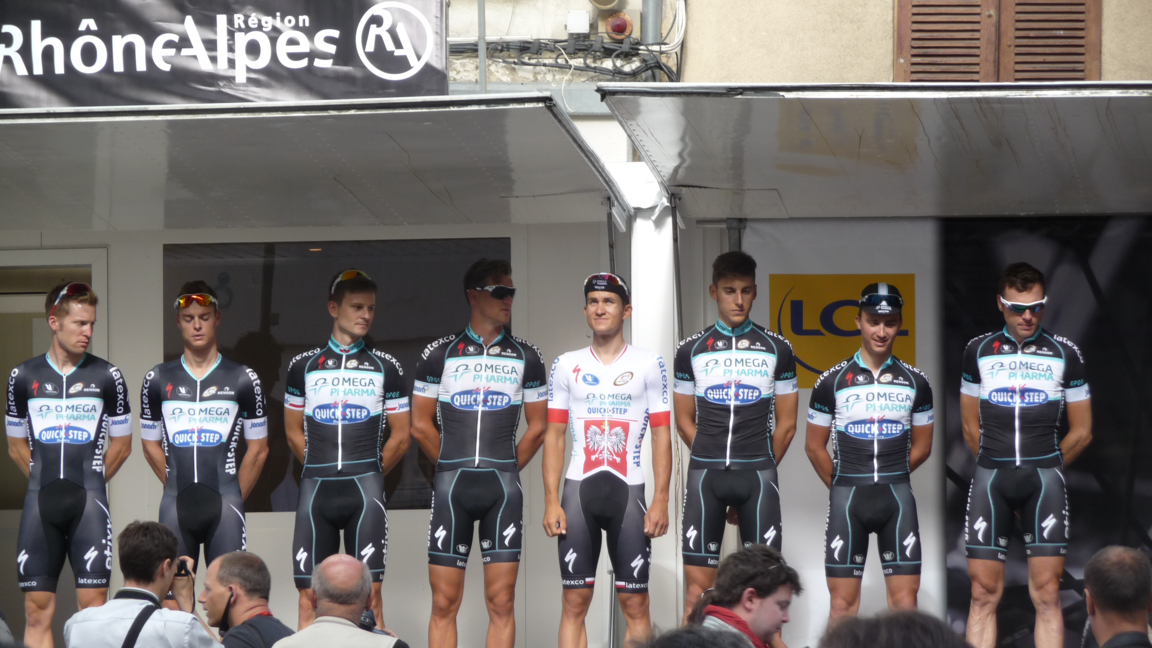 Présentation des équipes du Critérium du Dauphiné 2014 lors du départ de la 2ème étape à Tarare.